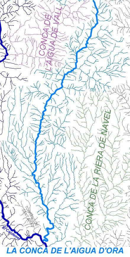 Mapa de la conca de l'Aigua d'Ora (Berguedà, Bages i Solsonès)